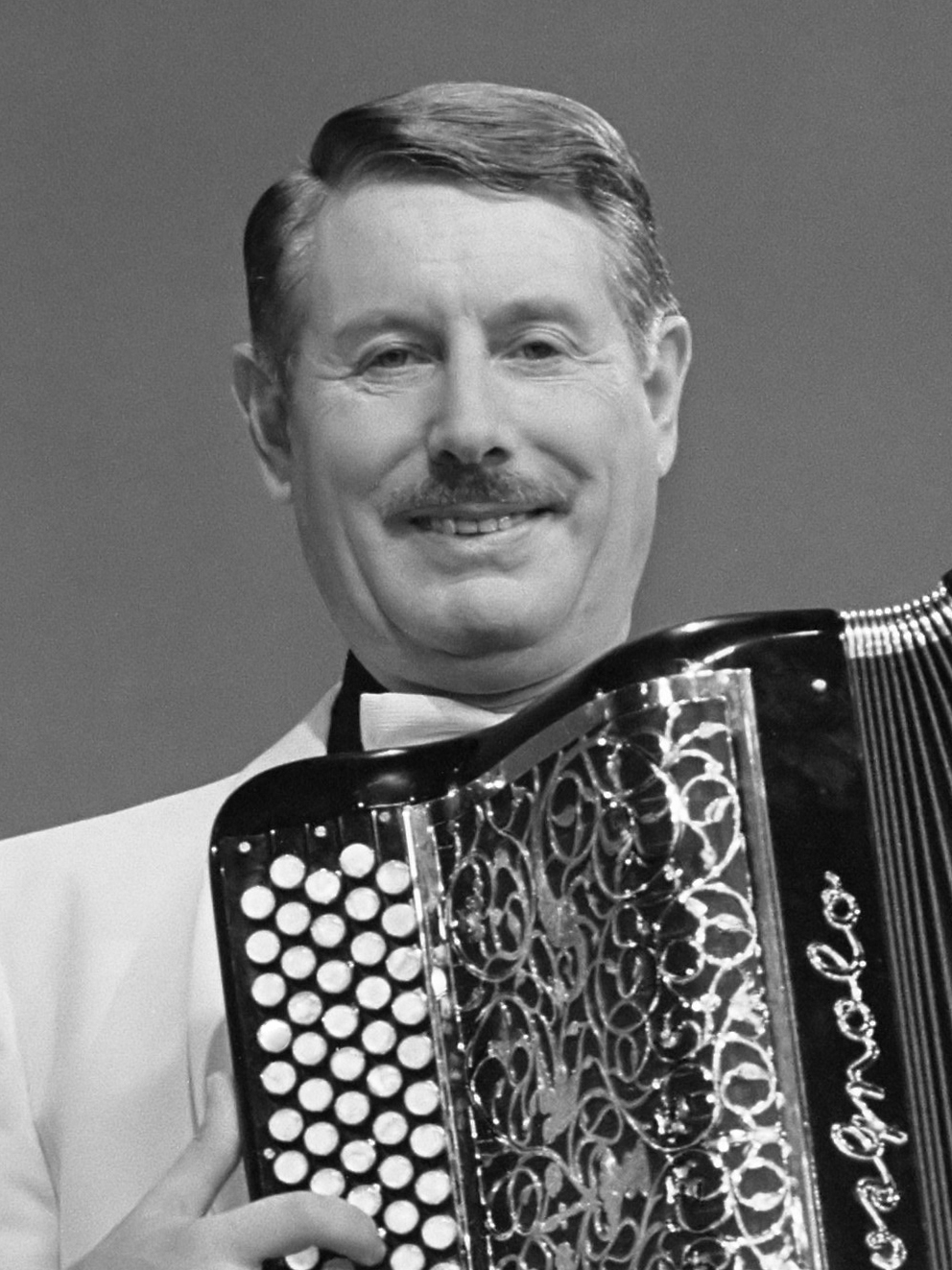 John Woodhouse tijdens TV-opname 14 november 1972